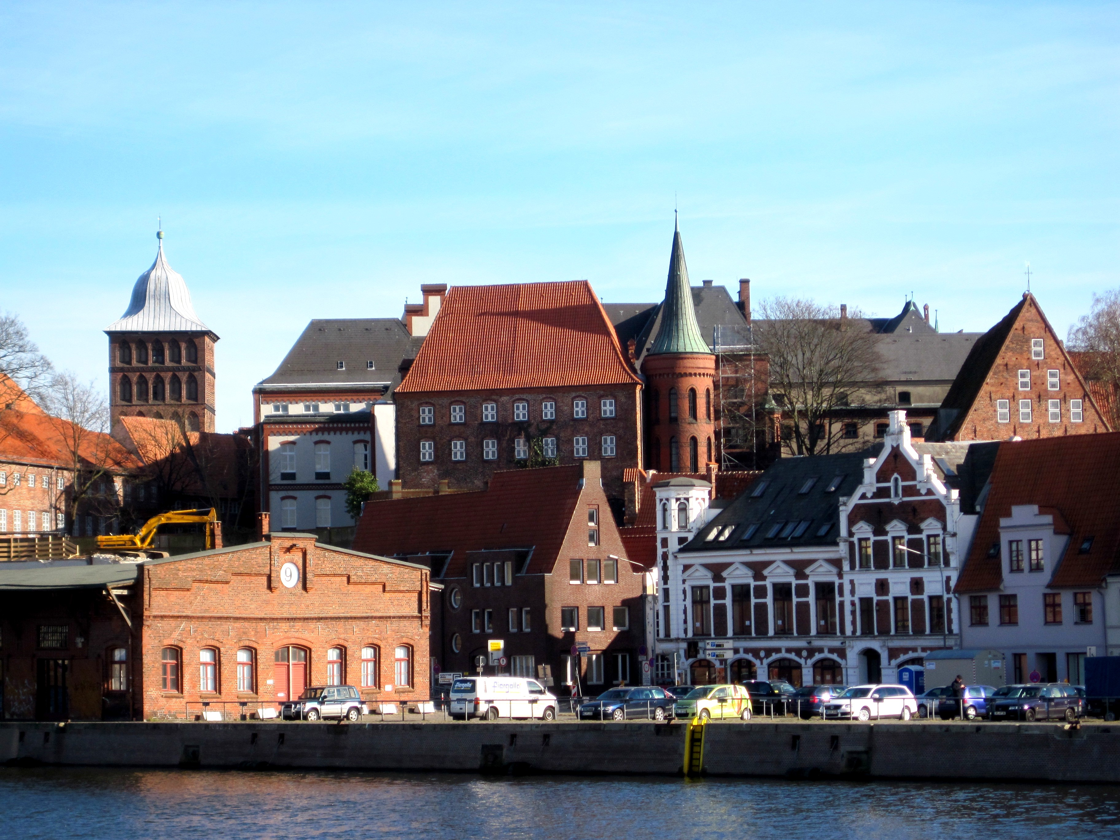 Burgkloster Lübeck im März 2012. Das rote Backsteingebäude rechts neben dem Schuppen 9, an der Ecke Kleine Altefähre, beherbergte die finnische Seemannsmission in Lübeck, es wird noch abgerissen und in das künftige Europäische Hansemuseum einbezogen.